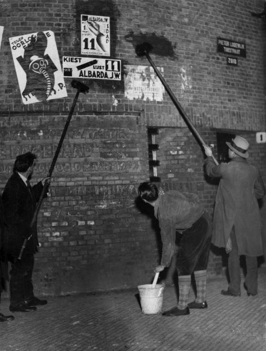 Het aanplakken van verkiezingsposters van de SDAP met lijsttrekker J.W. Albarda in de Amsterdamse Pieter Lodewijk Takstraat, 1933.